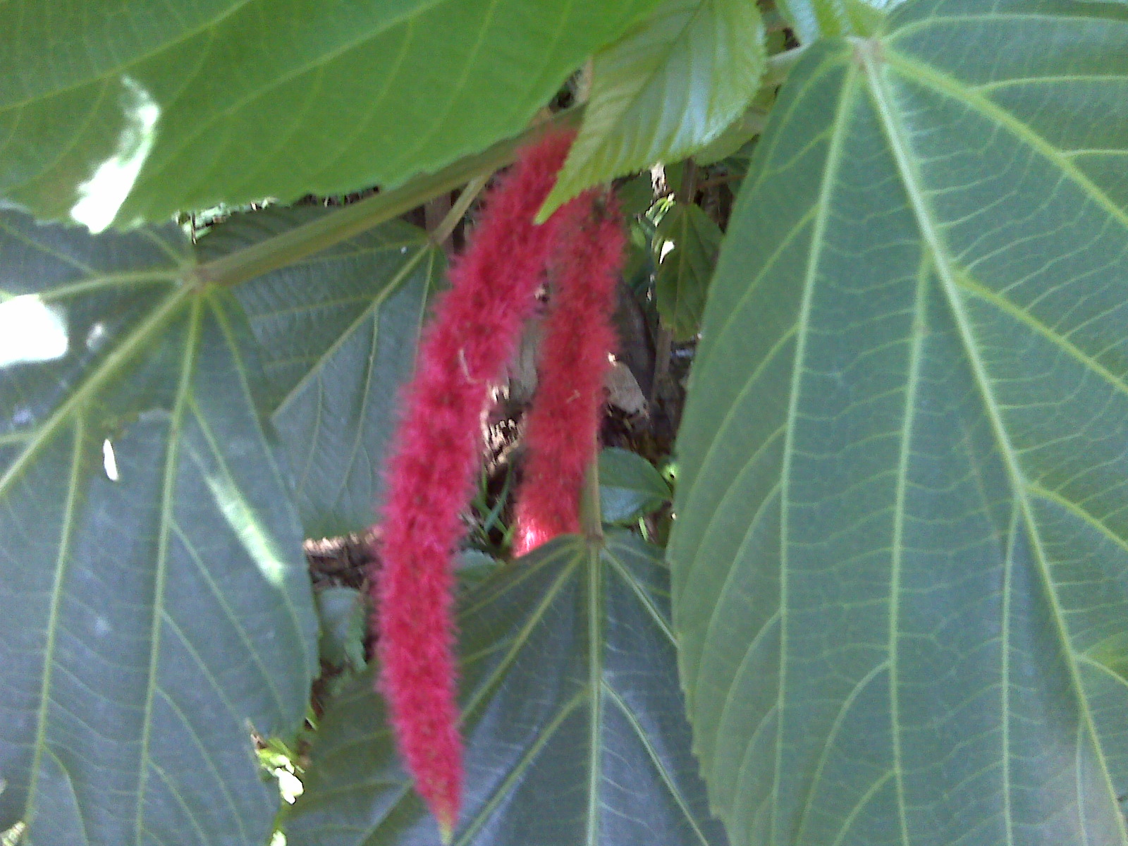 Amaranthus dubius en La Boyera (El Hatillo), estado Miranda - Venezuela (2012)